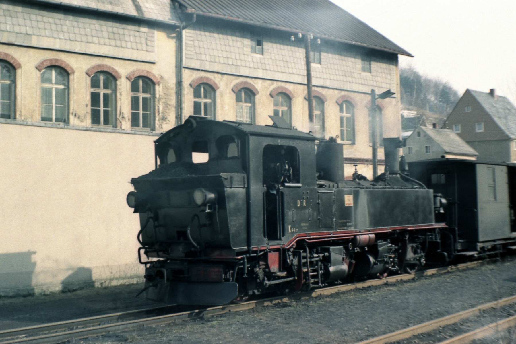 Schmalspurdampflokomotive 99 561 als 99 1561 in Niederschmiedeberg 14.03.84